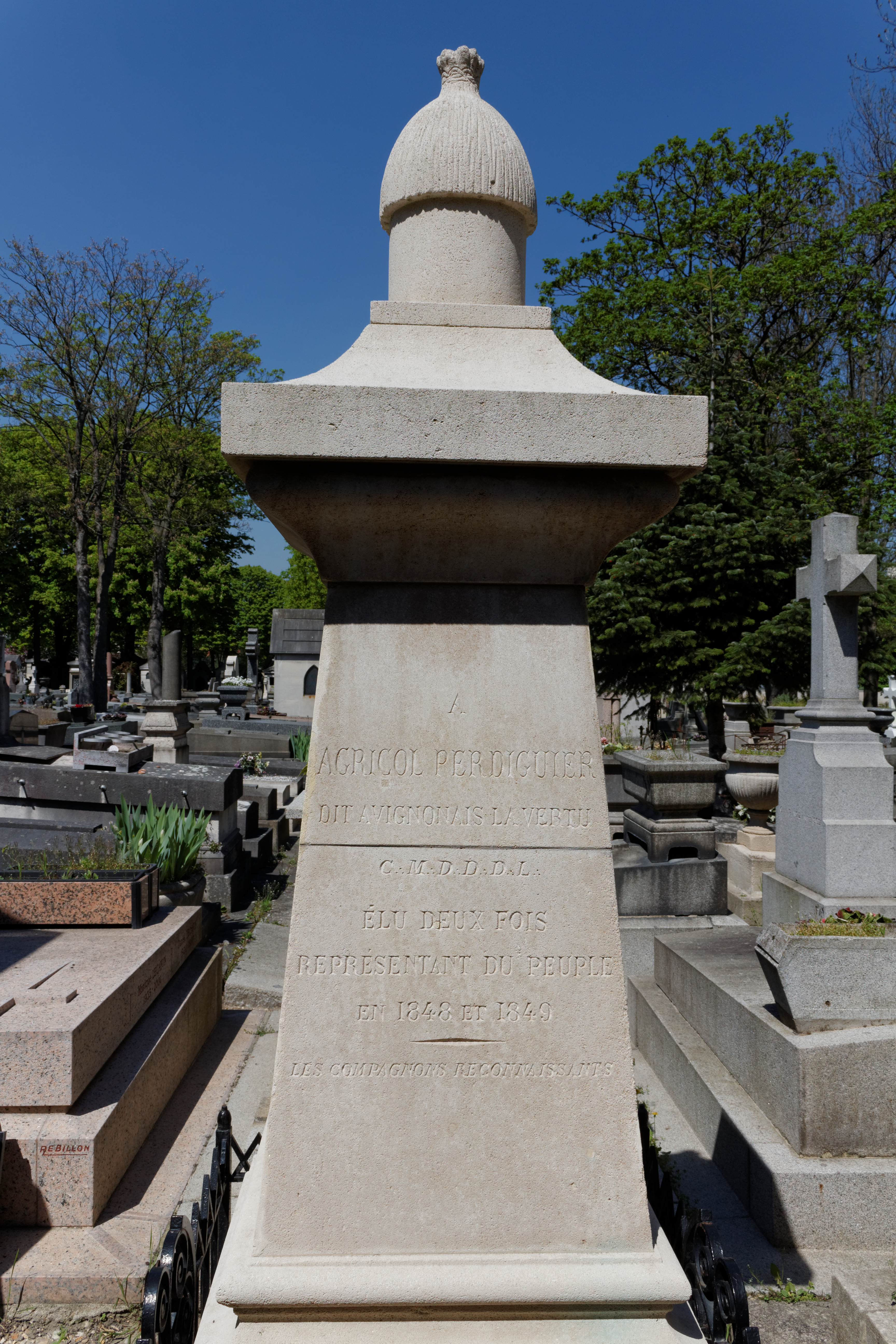 Stèle surmontée d'une ruche